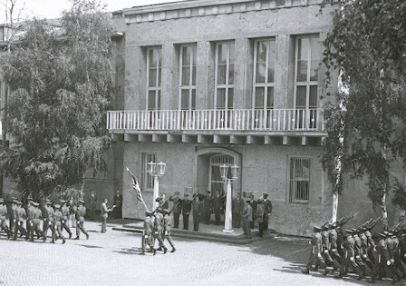 US Headquarter Berlin Dahlem; Parade 1948 mit Gen Lucius D. Clay